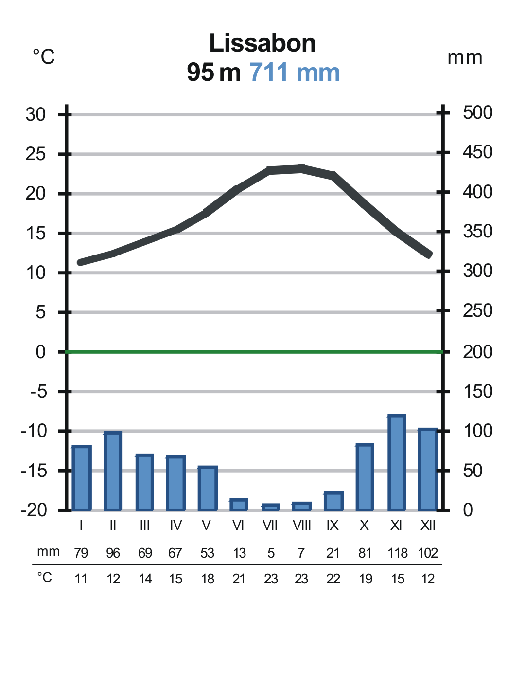 Lissaboni kliimadiagramm (Portugal)